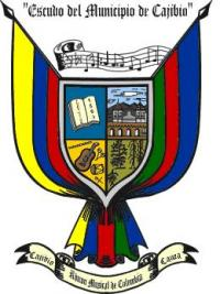 Escudo de Cajibio, Cauca